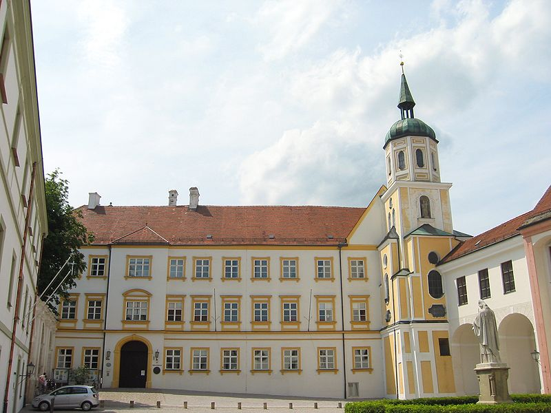 Freising, ehem. fürstbischöfliche Residenz, jetzt Kardinal-Döpfner-Haus, im Kern 14. Jh., mit Arkaden im Hof 1519, 1607–22 umgebaut, 1617–21 Hauskapelle im Nordostturm eingerichtet